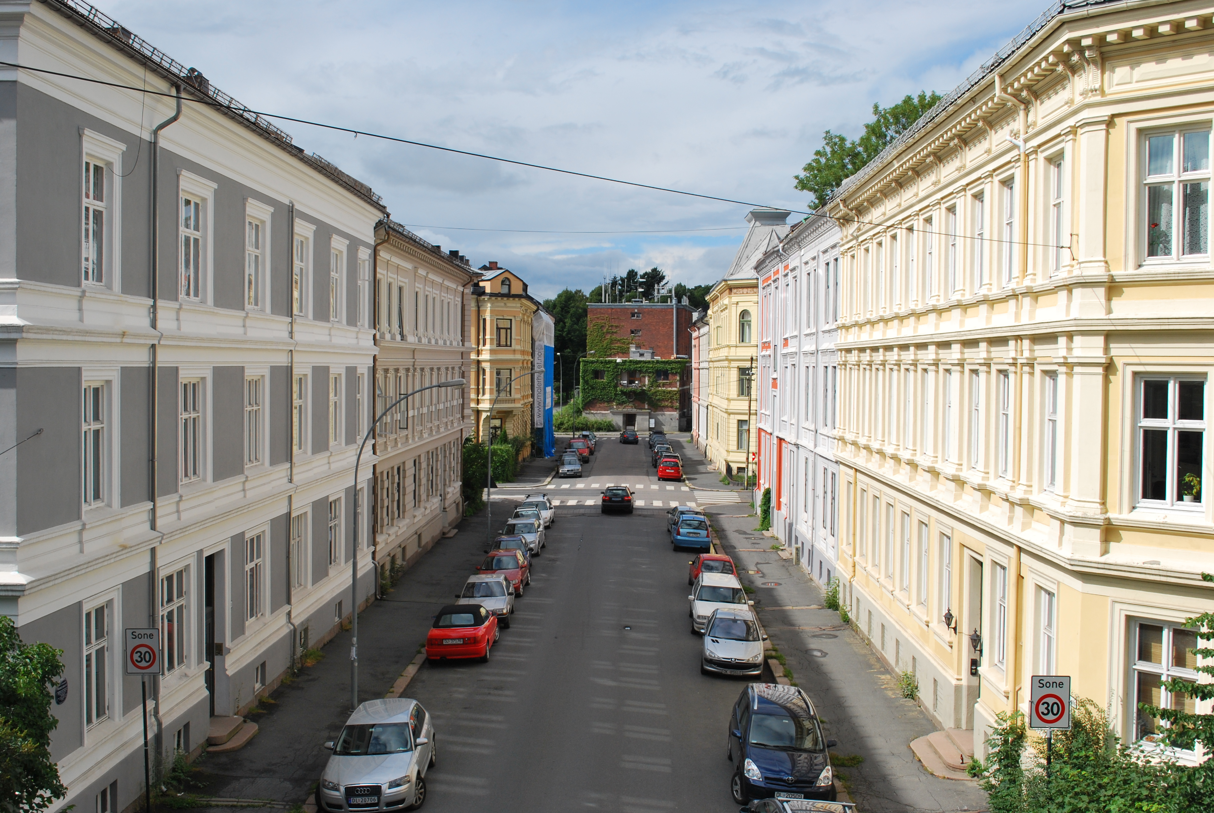 Jørgen Moes street (Norw. gate), Briskeby, Oslo